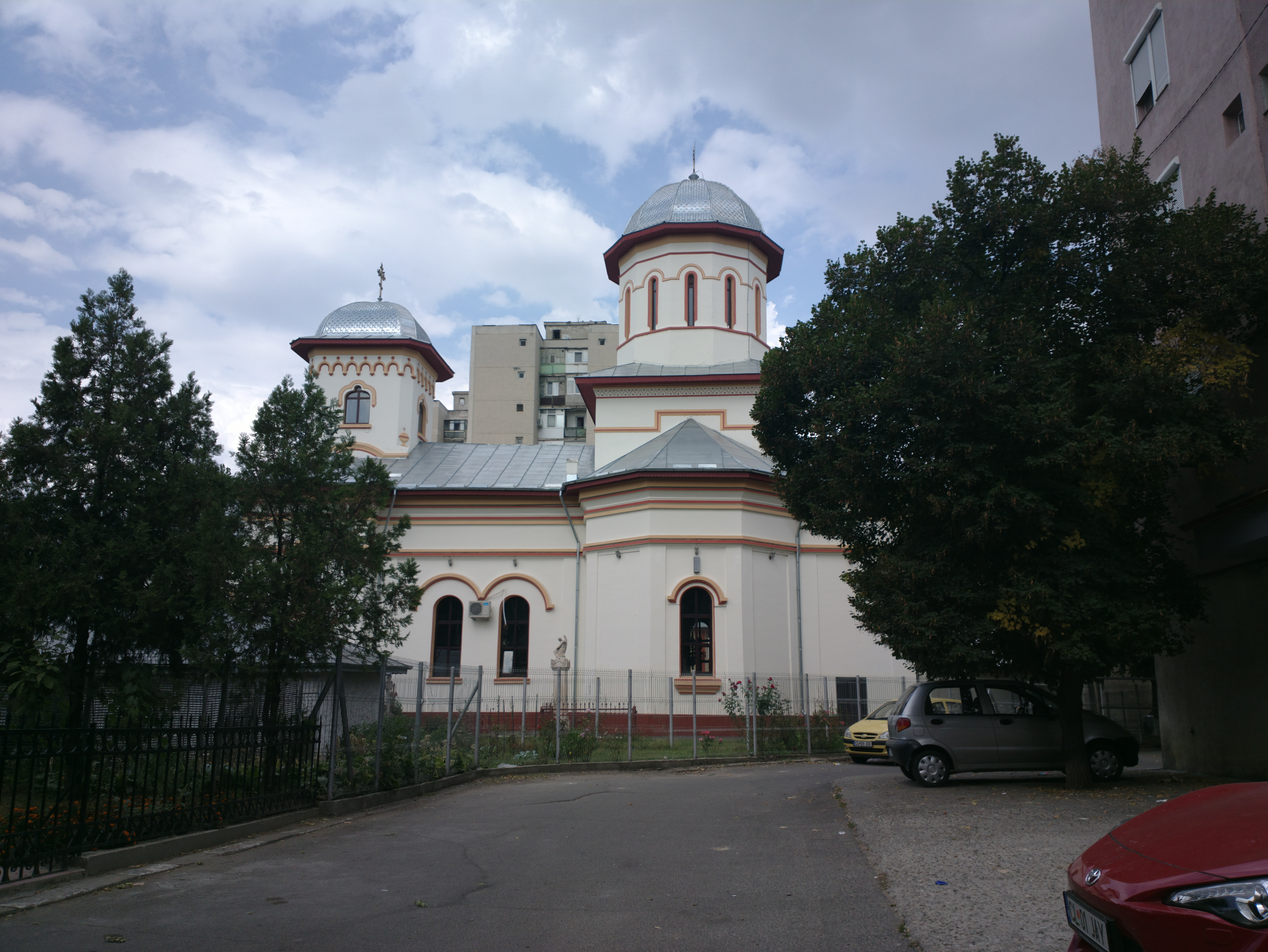 Biserica „Sf. Nicolae” 01